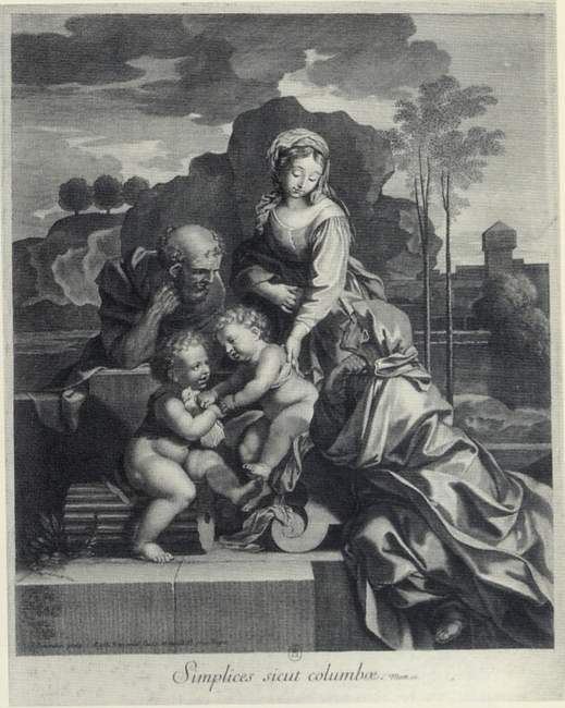 Gilles Rousselet (1610-1686), d’après Sébastien Bourdon "Sainte Famille, sainte Elisabeth et saint Jean-Baptiste dans un paysage"